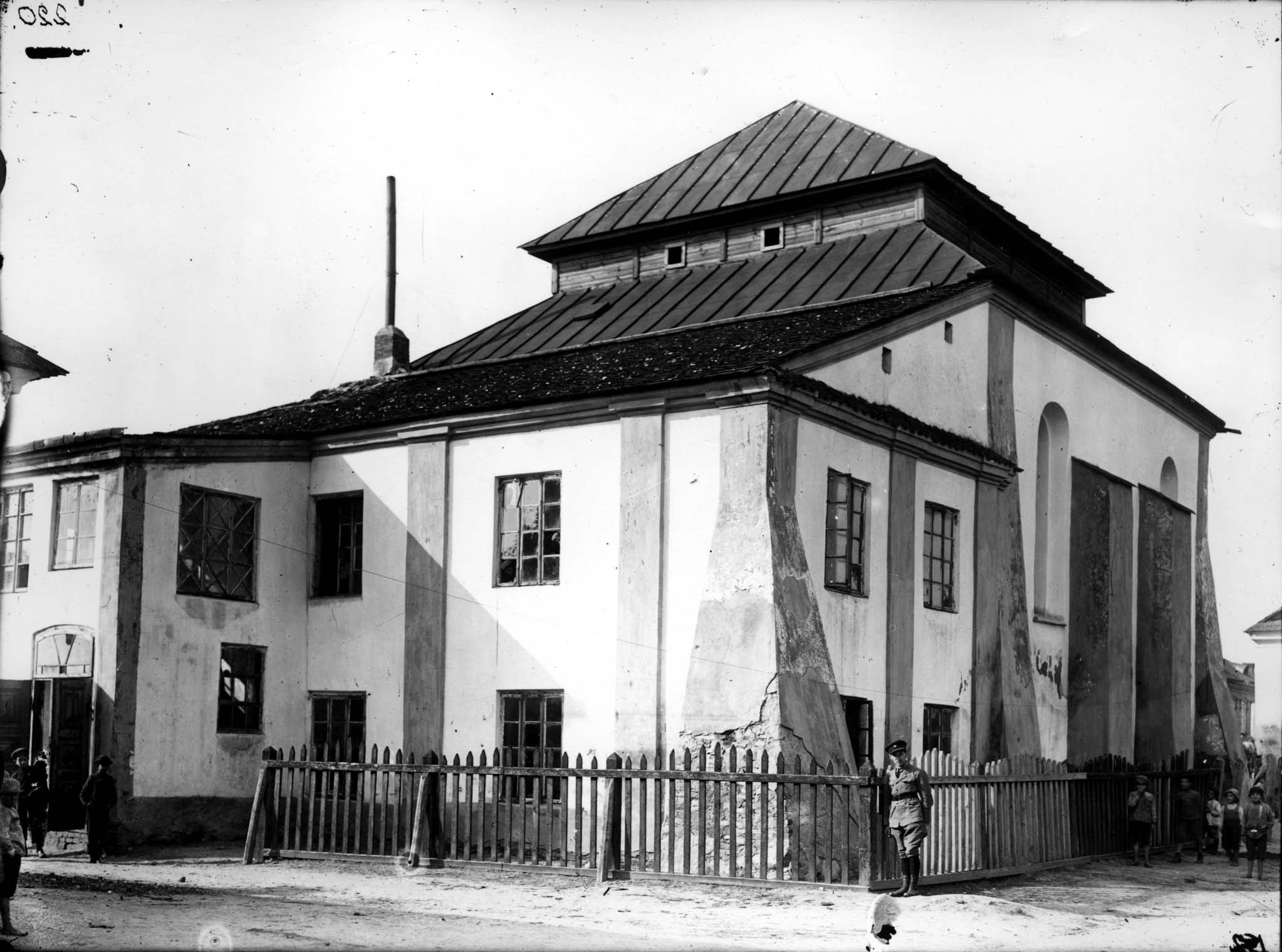 Беларуская (тарашкевіца): Нясьвіж (Niaśviž), Школішча (Školišča). Халодная сынагога